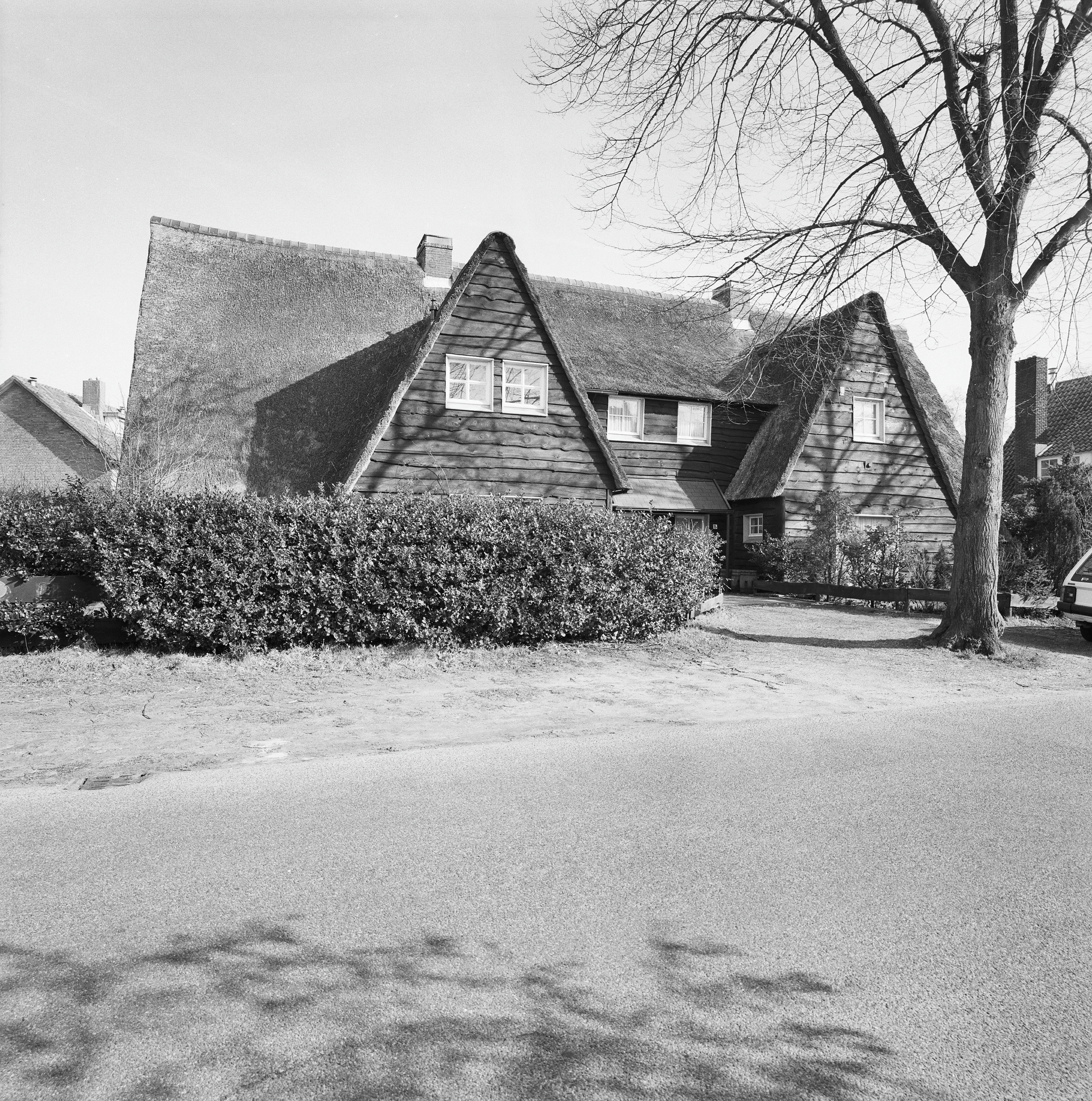 Exterieur VOORGEVEL (opmerking: Gefotografeerd voor MIP Noord-Holland)